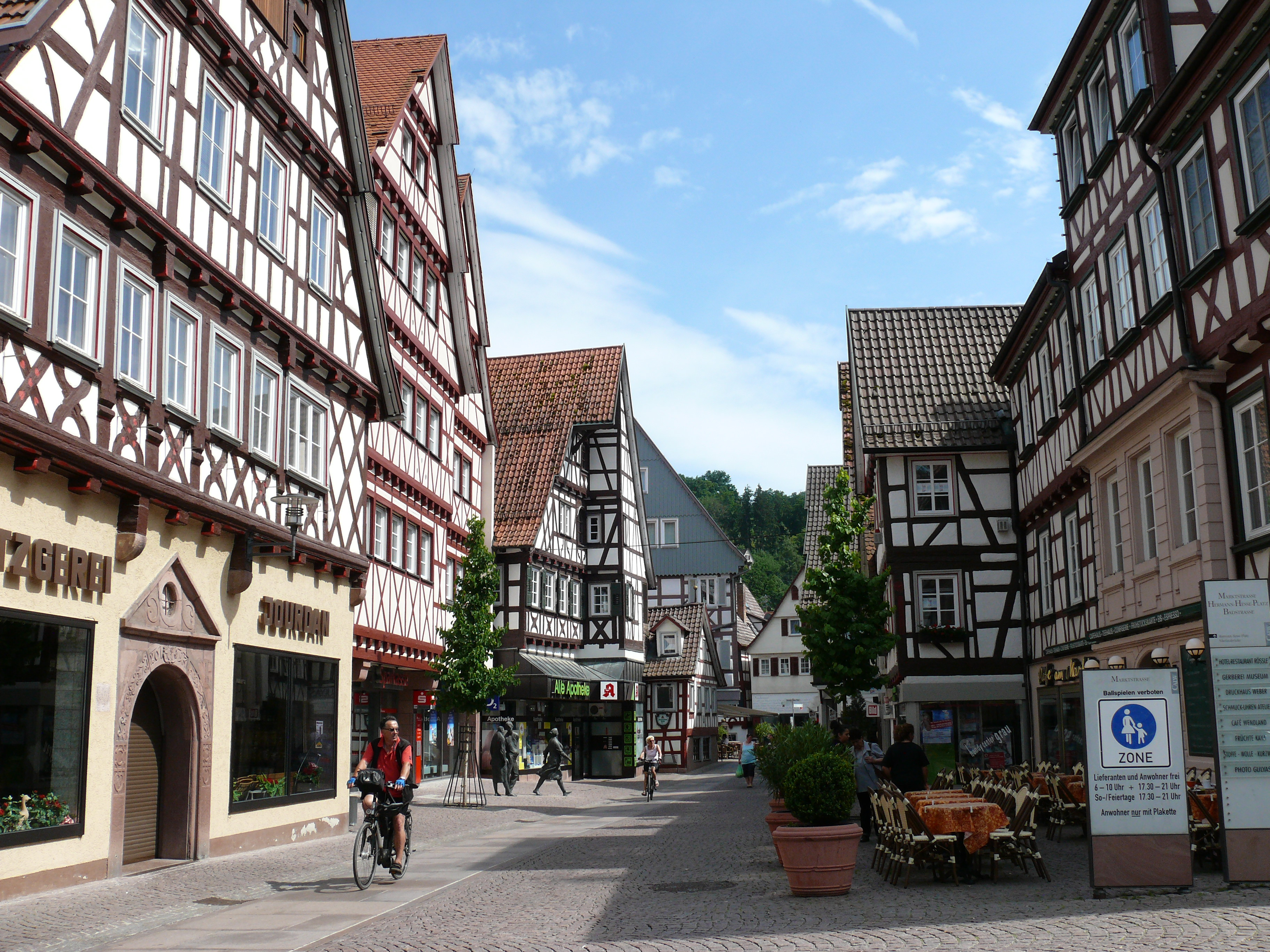 Die Marktstraße mit tollen Fachwerkhäusern in Calw.